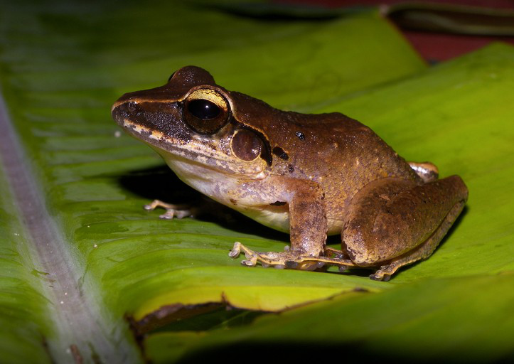 Craugastor raniformis